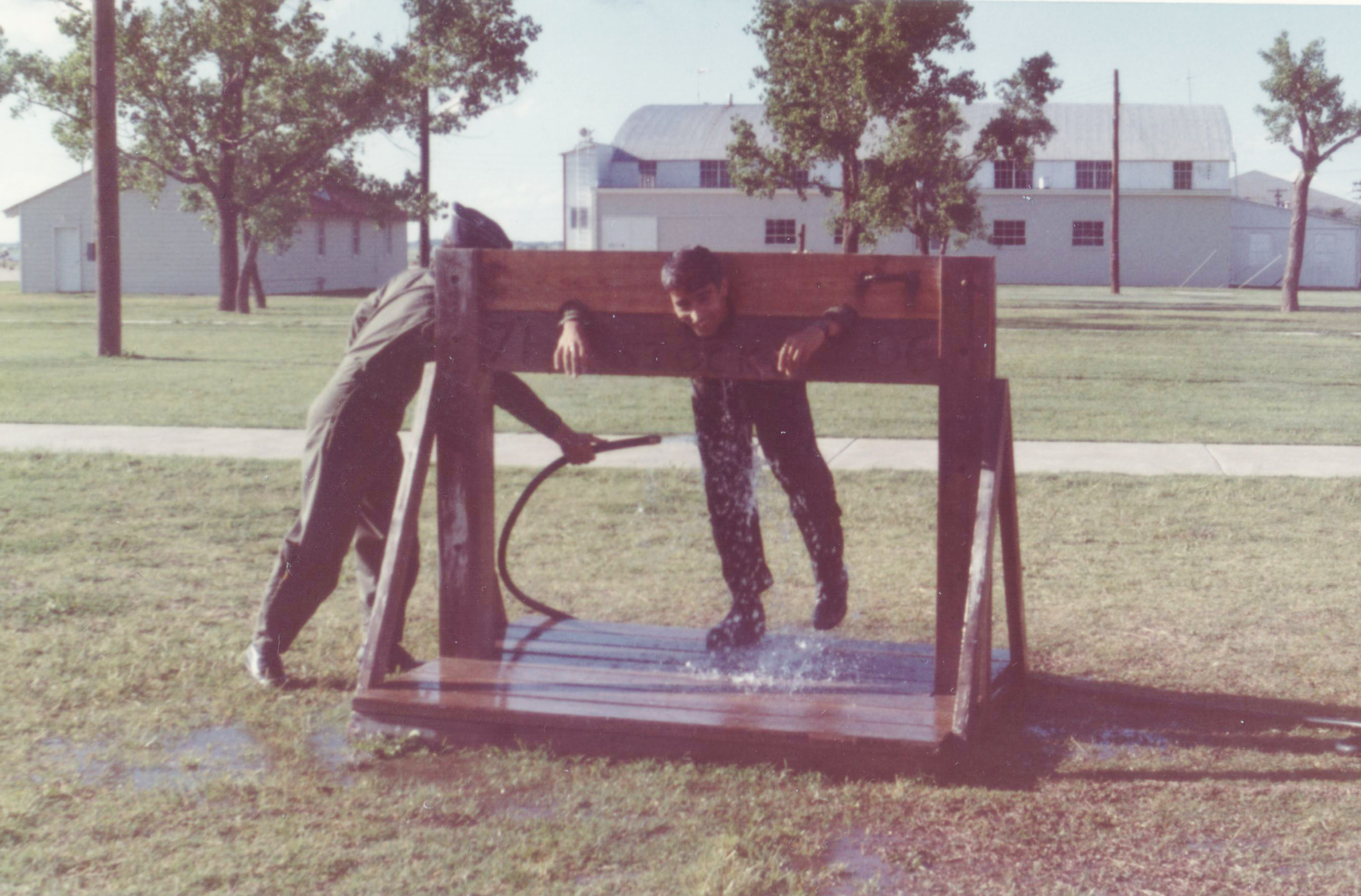 مراسم نخستین پرواز سولوی جلیل زندی در پایگاه هوای ونس، اوکلاهما، در سال 1972